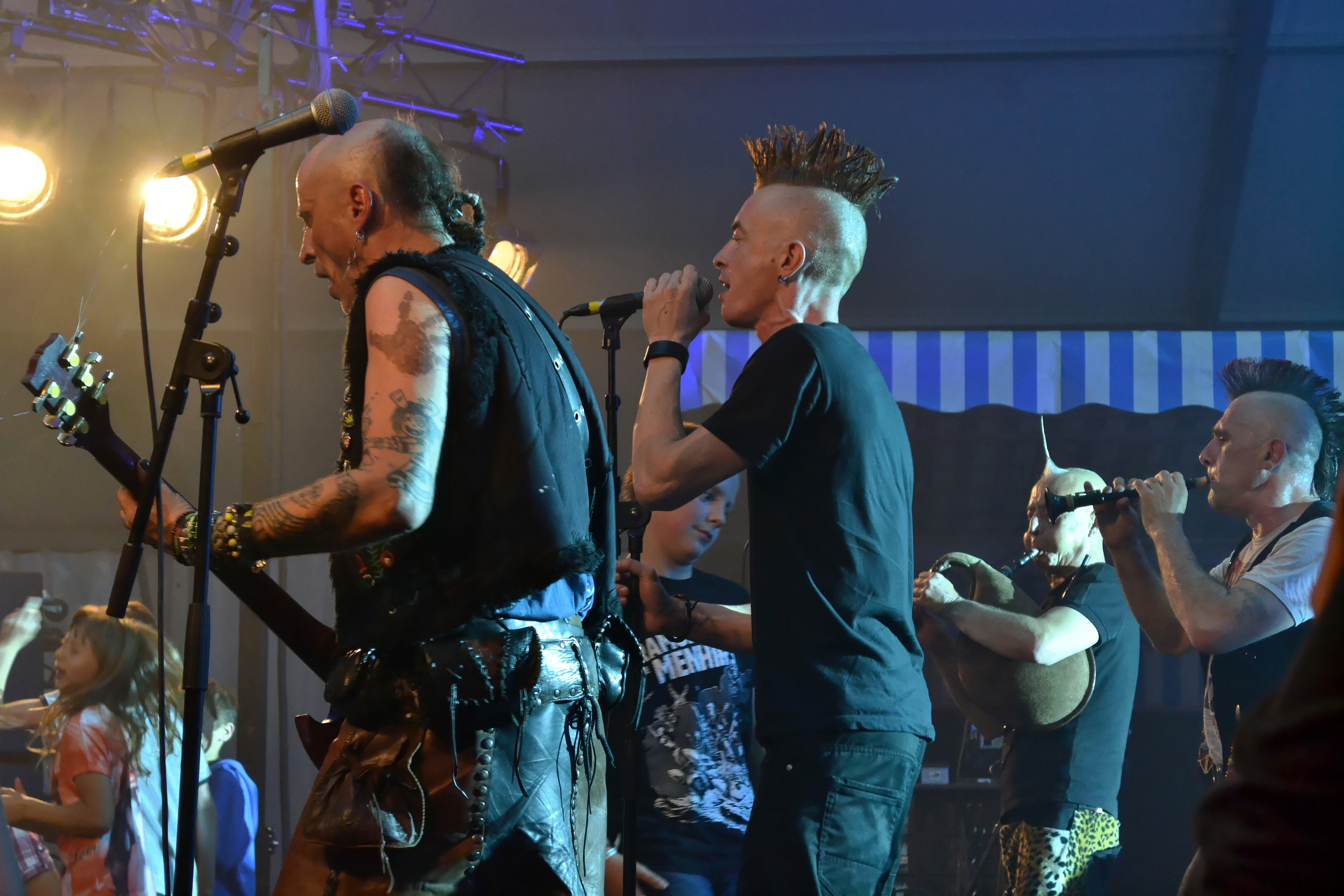 Le groupe punk breton Les Ramoneurs de Menhirs lors du Cyber fest-noz organisé en clôture de la 60e Fête des brodeuses de Pont-l'Abbé.